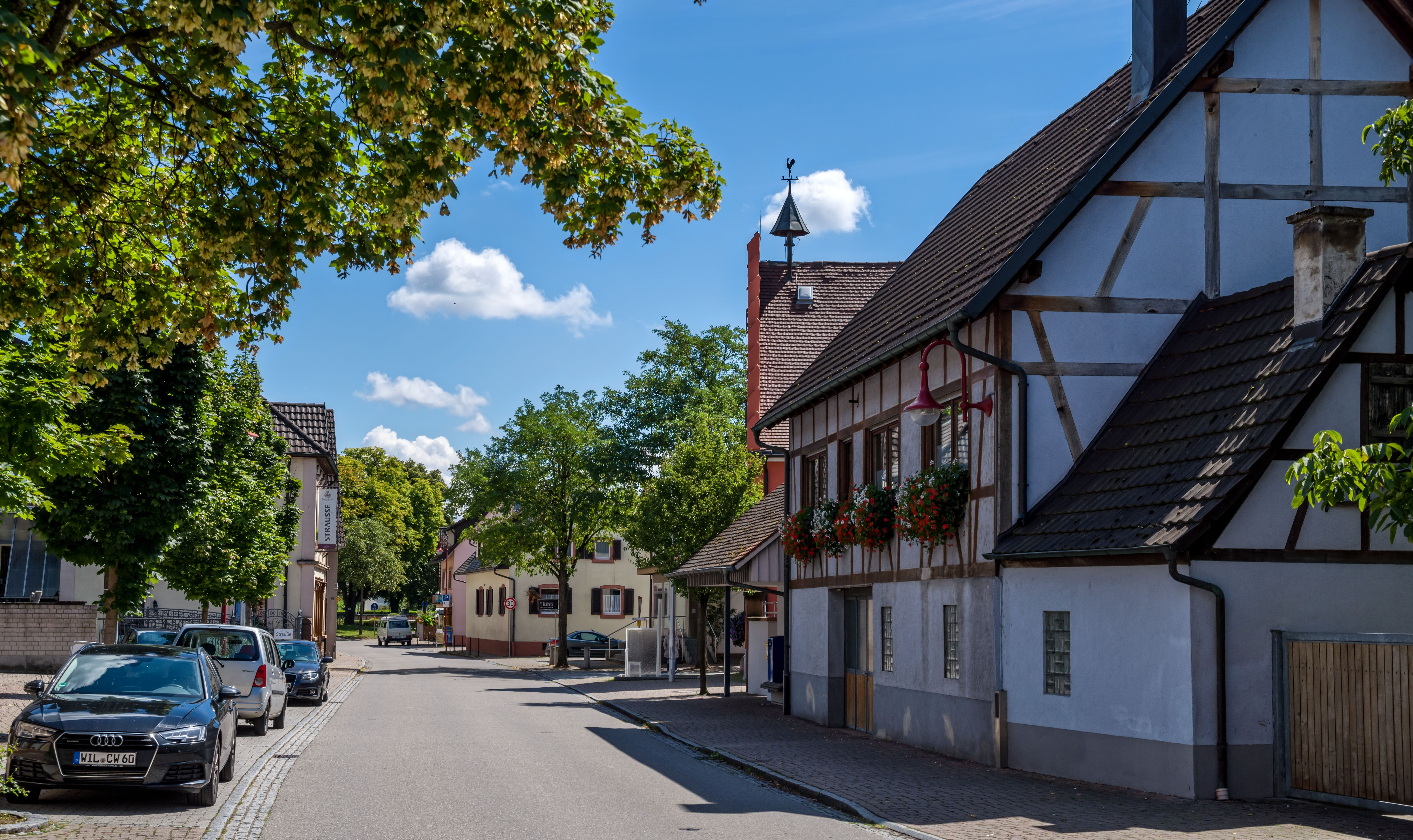 Bilder aus Gottenheim